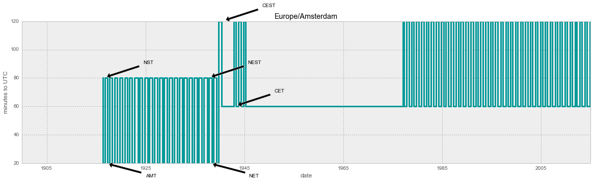 De tijdzones in Nederland zijn meerdere keren veranderd. Bijgevoegd overzicht laat de historie zien in de 20e eeuw. Gemaakt met notebook